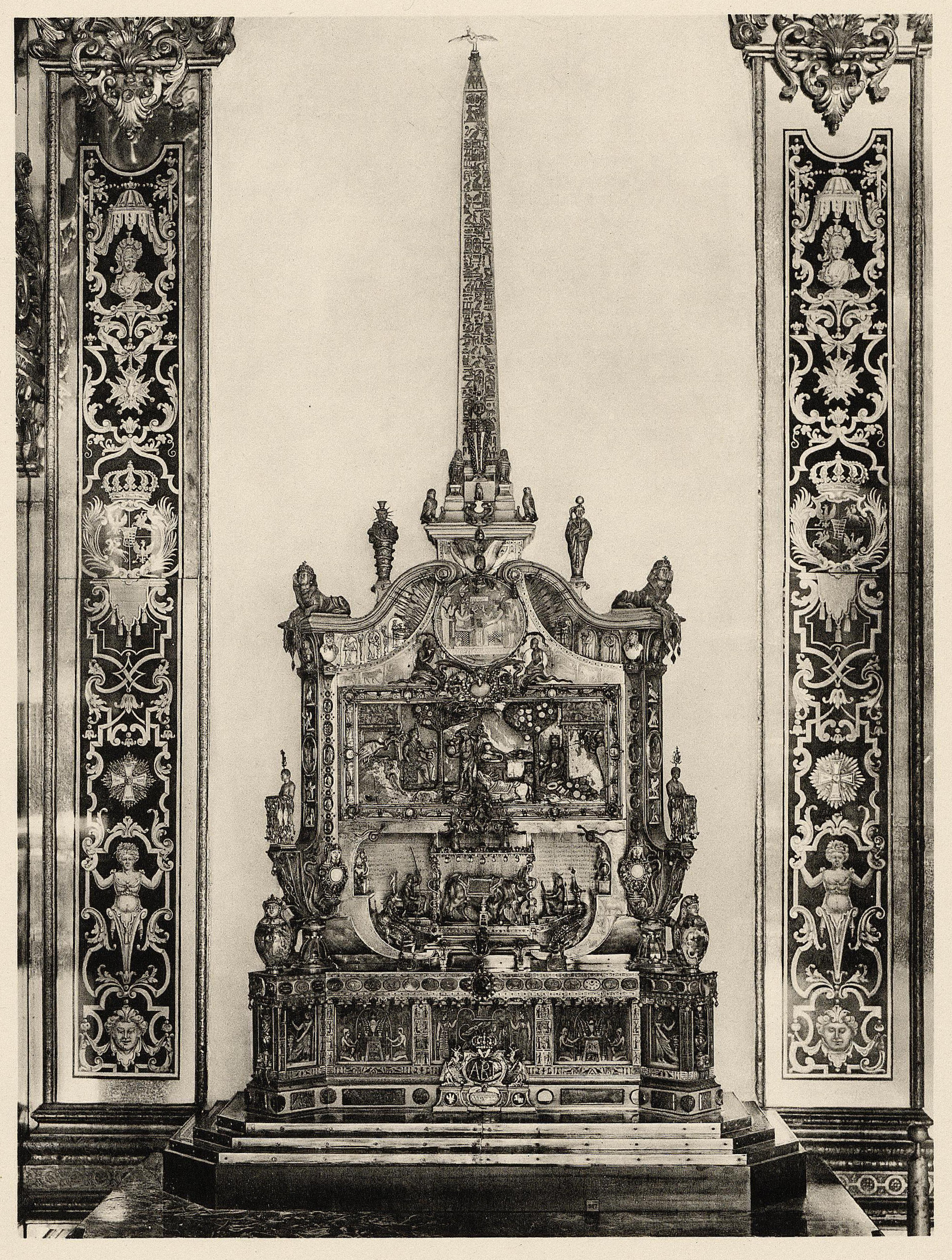 Der Tempel des Apis. Altarähnlicher Aufbau aus Kalkstein, von einem Obelisken gekrönt und ausgestattet mit Motiven des ägyptischen Götterglaubens und Totenkultus in Gravierungen, Gemmen, Reliefs und Figuren der verschiedensten Stoffe und Techniken und aufs reichste mit Email und Juwelen verziert. Auf zwei Gemmen die Jahreszahl 1729 und 1731 und auf einer Inschriftplatte: 1731. Von Melchior begonnen und von seinem Sohn Johann Friedrich Dinglinger fertiggestellt (Beschreibung gemäß Quelle) aus: Das Grüne Gewölbe zu Dresden: eine Auswahl von Meisterwerken der Goldschmiedekunst ; in vier Bänden (Band 3): Kleinodien der Goldschmiedekunst: verziert mit Email und Juwelen, Erzeugnisse der Steinschneidekunst in Bergkristall und farbigen Steinarten in kostbarsten Fassungen, Galanteriewaren und Nippesfiguren, Kabinettstücke ; mit 59 Lichtdrucktafeln, davon 7 farbig. Hiersemann, Leipzig